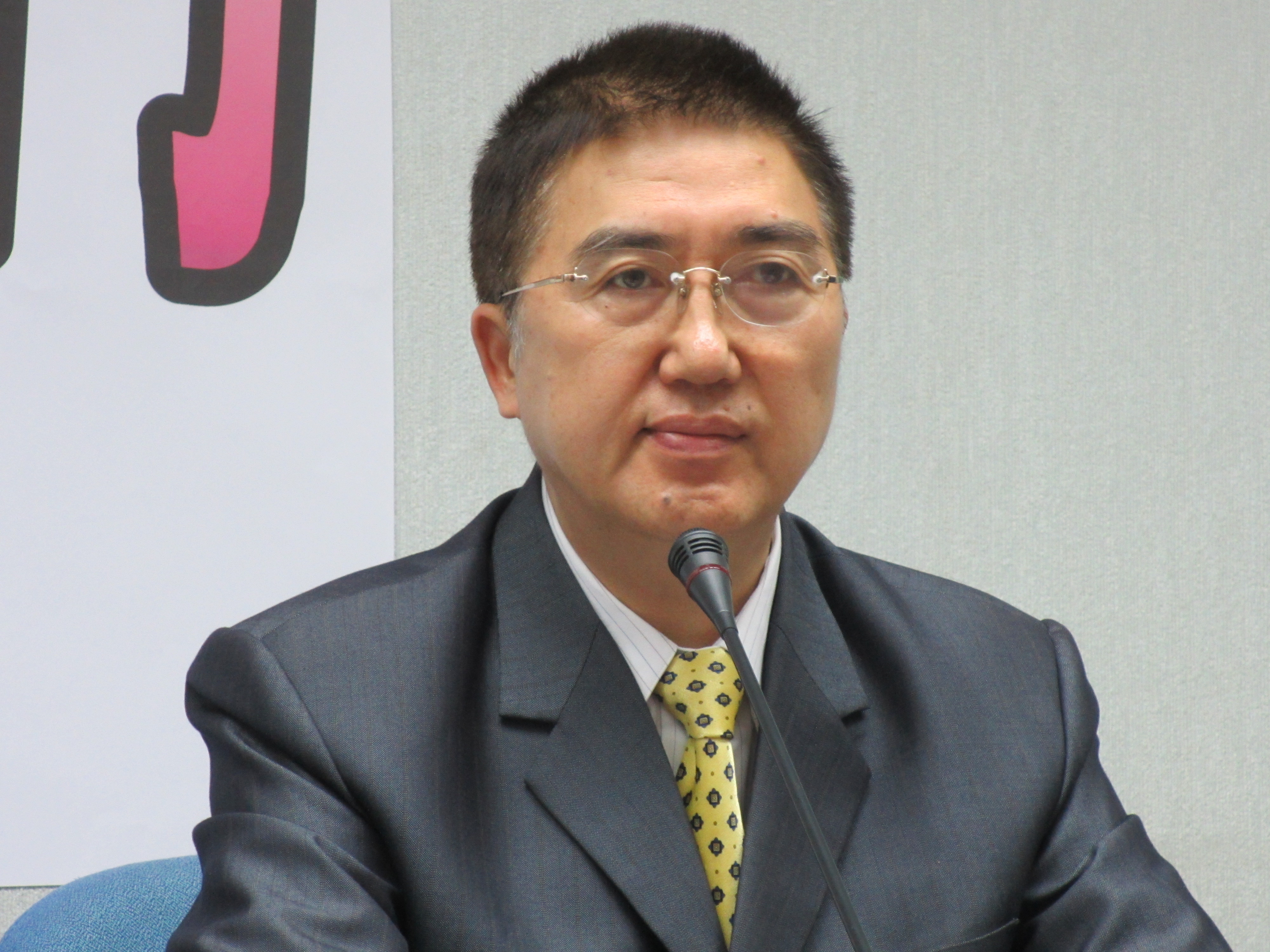 中國國民黨籍立法委員林鴻池